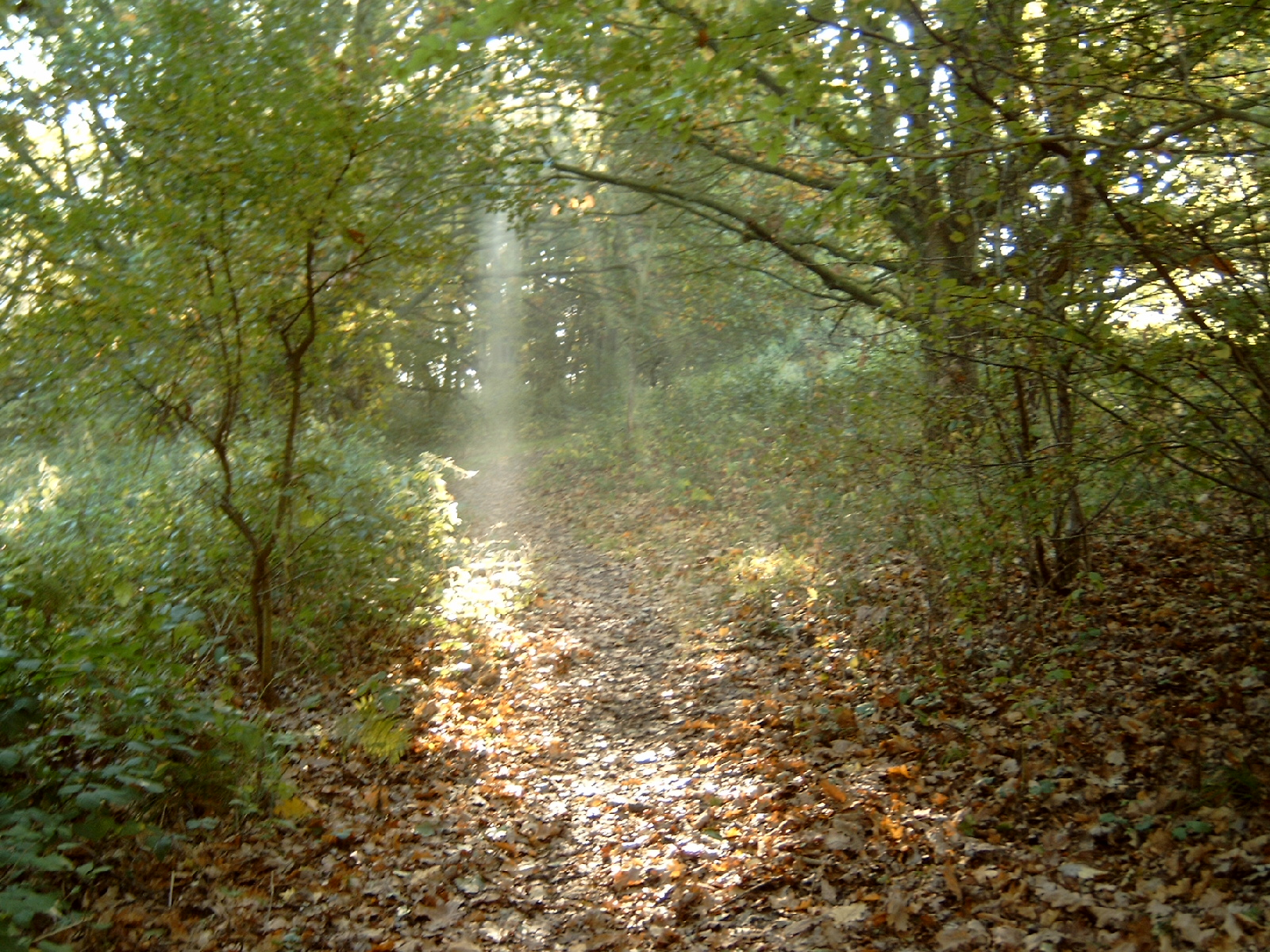 Strandfrieden Flensburg Mürwik beim Landschaftsschutgebiet Twedter Mark